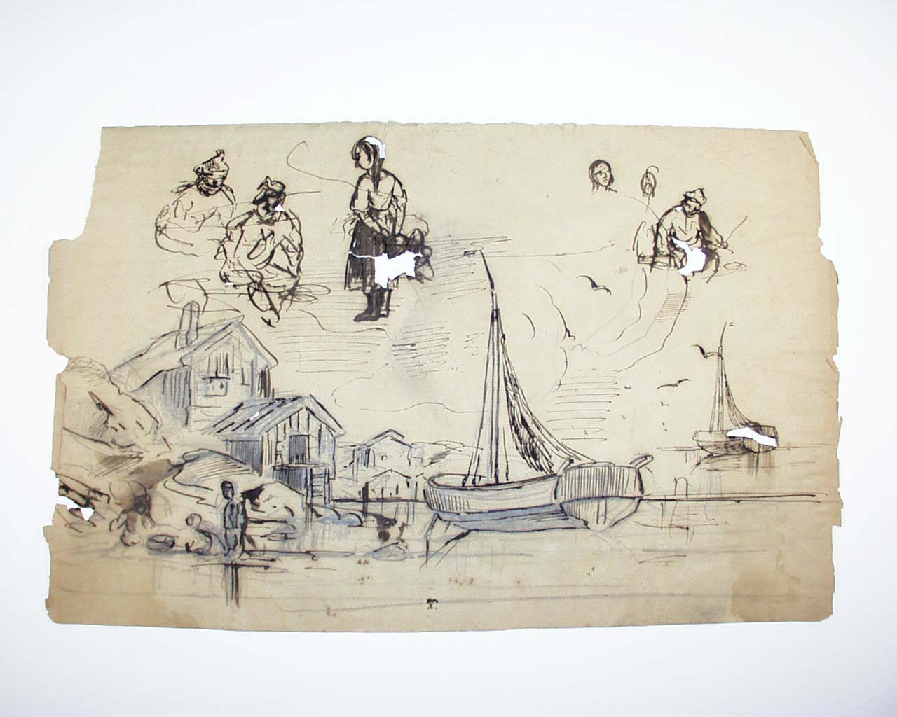 Eksempel på nedbrudt jerngallusblæk-tegning. Uregistreret dokument uden ophavsmand, Det Kongelige Bibliotek